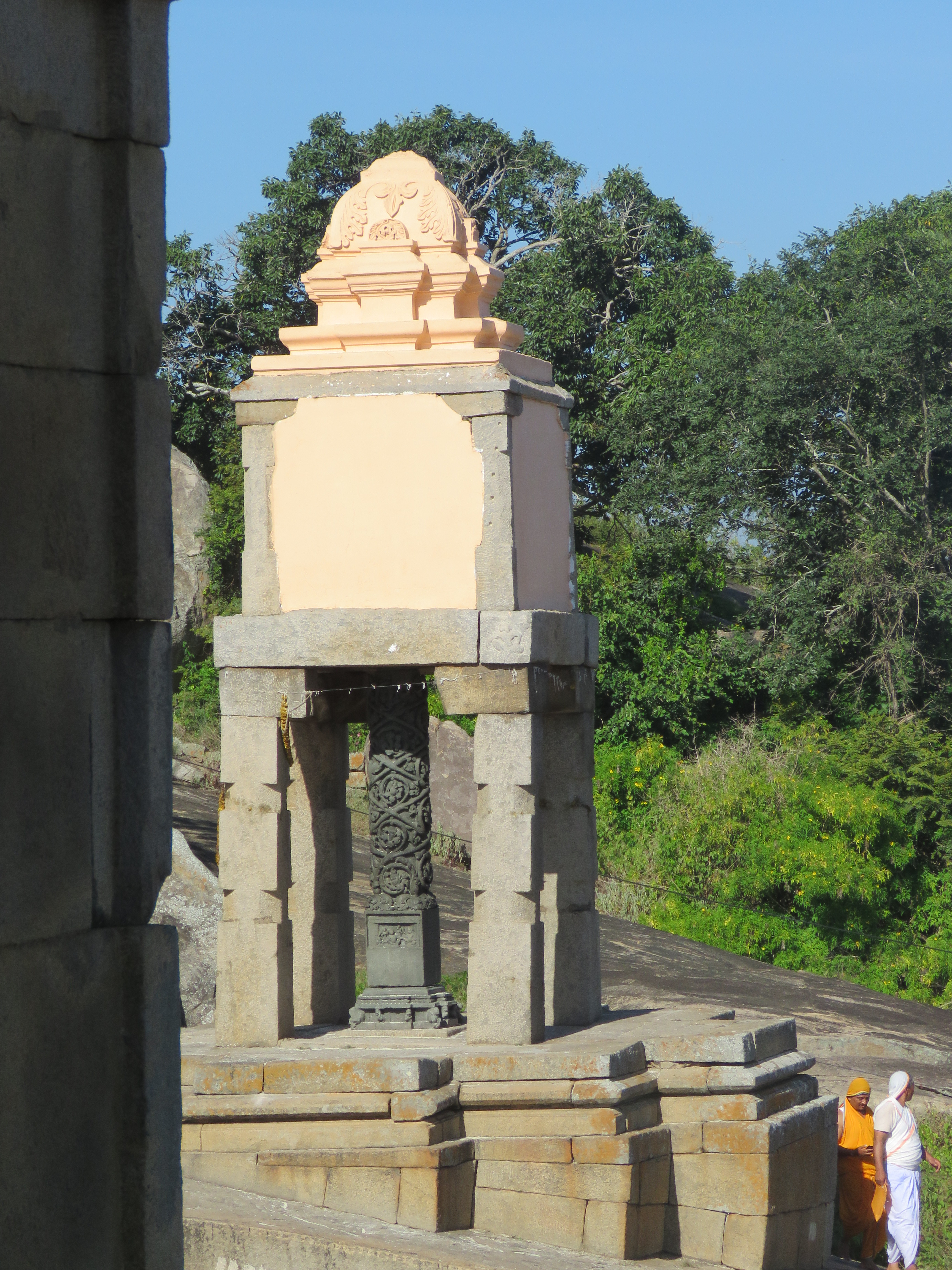 Photos from Shravanabelagola by Vinayaraj 2018